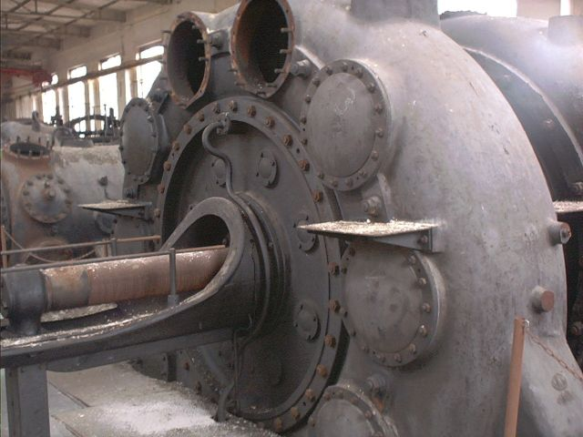 Teil eines Großkompressors